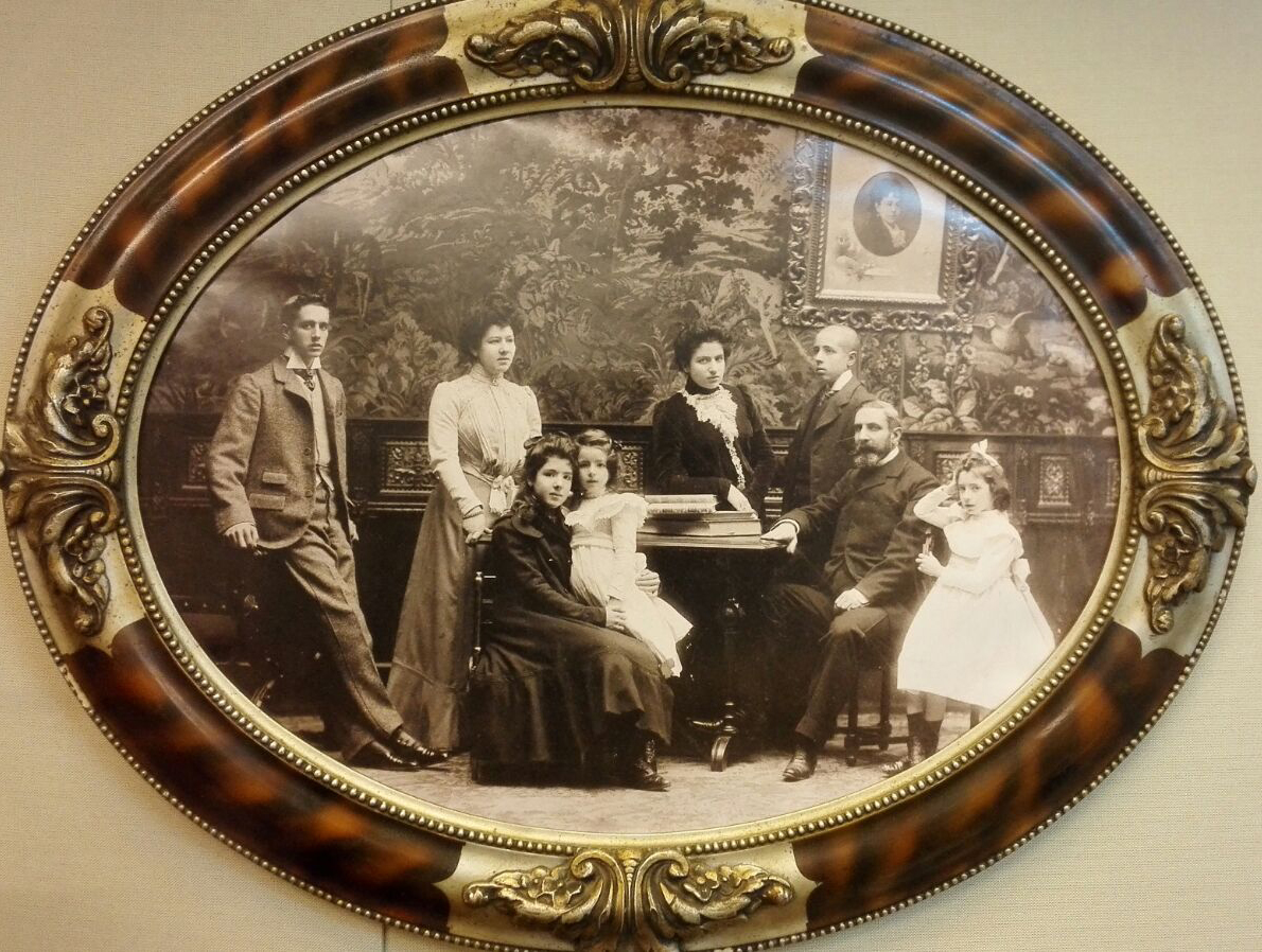 Josep Martorell i Cuni, empresari colonial i prohom de Calella, la seva esposa i els seus fills, en una fotografia tradicional de l'època, conservada al Museo de Calella